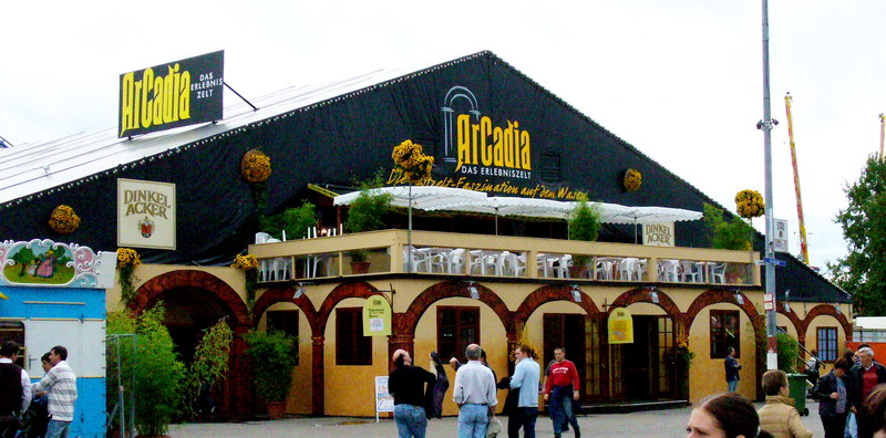 Cannstatter Volksfest Arcadia-Zelt